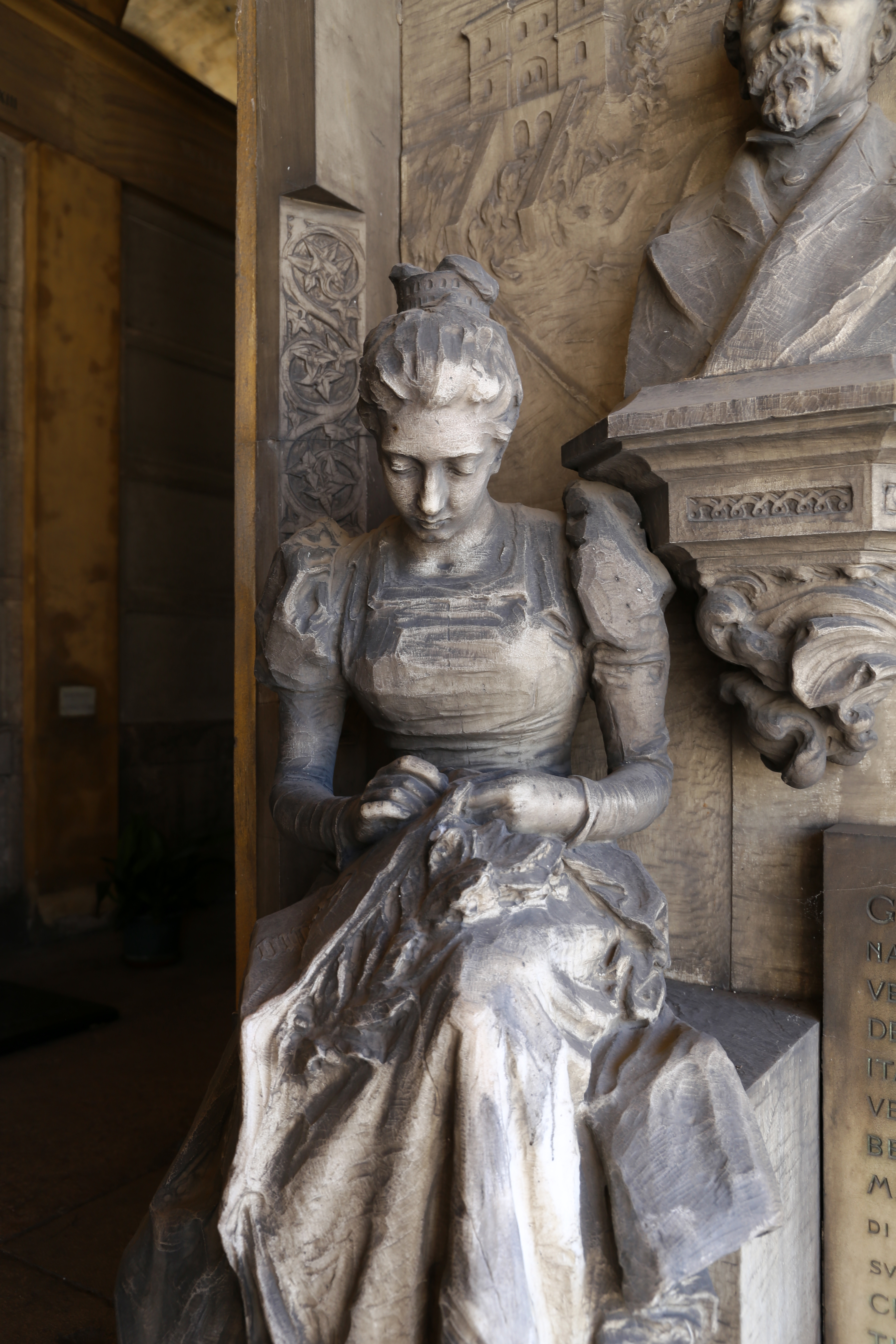 cimitero monumentale di Verona This is a photo of a monument which is part of cultural heritage of Italy.